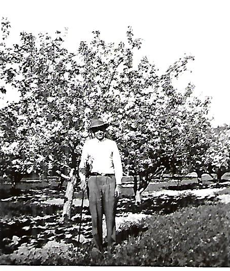 Jan-Erik omenatarhassa 1950-luvun alussa